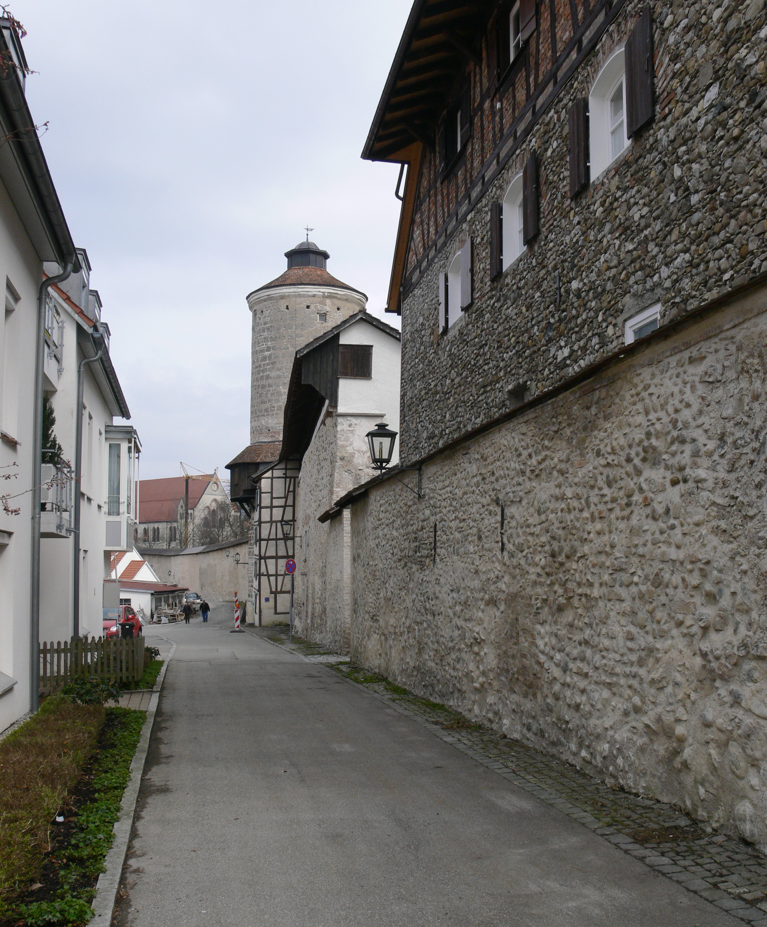 Isny im Allgäu, Blick zum Diebsturm